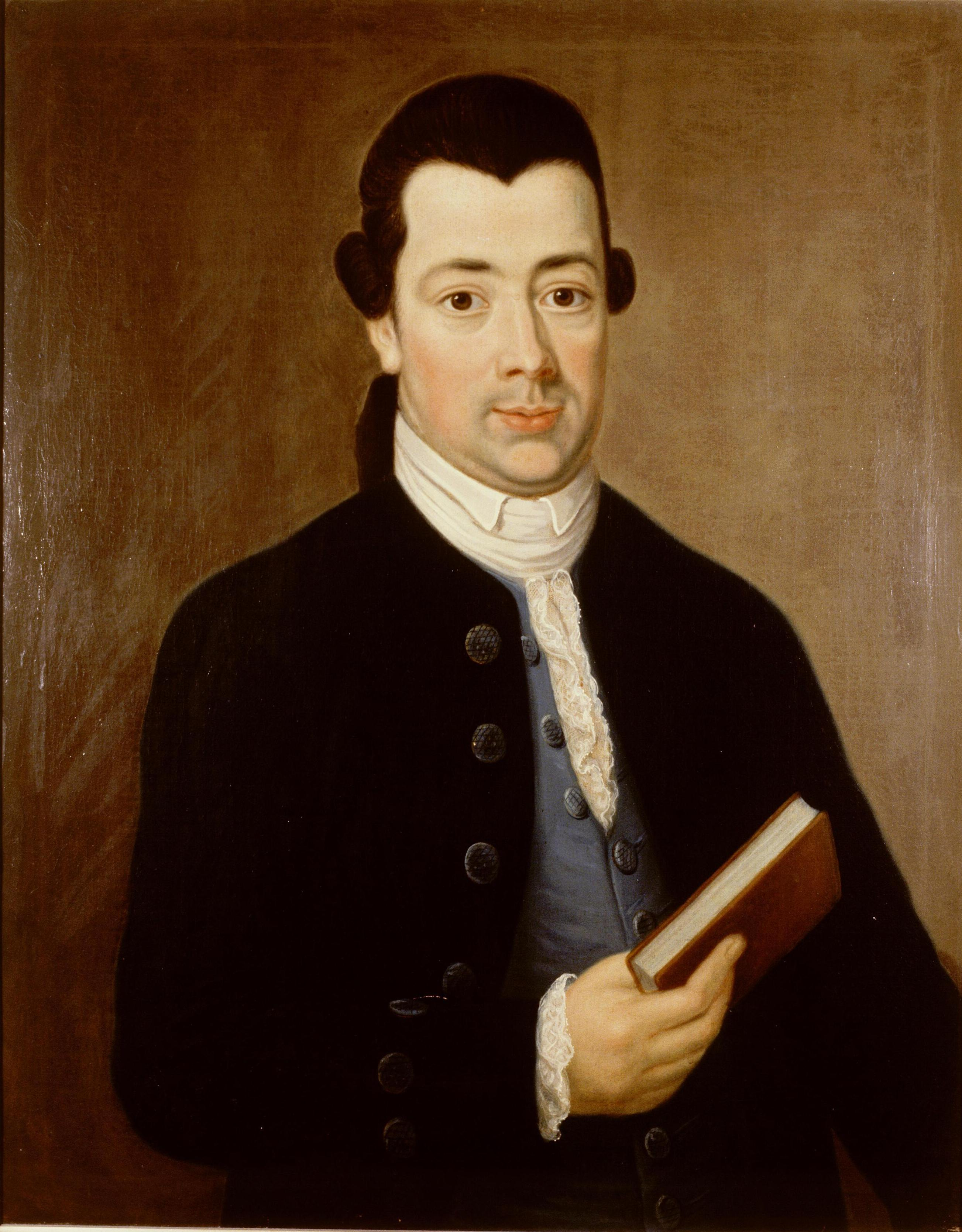 Tymen Kymmell (1749-1826)